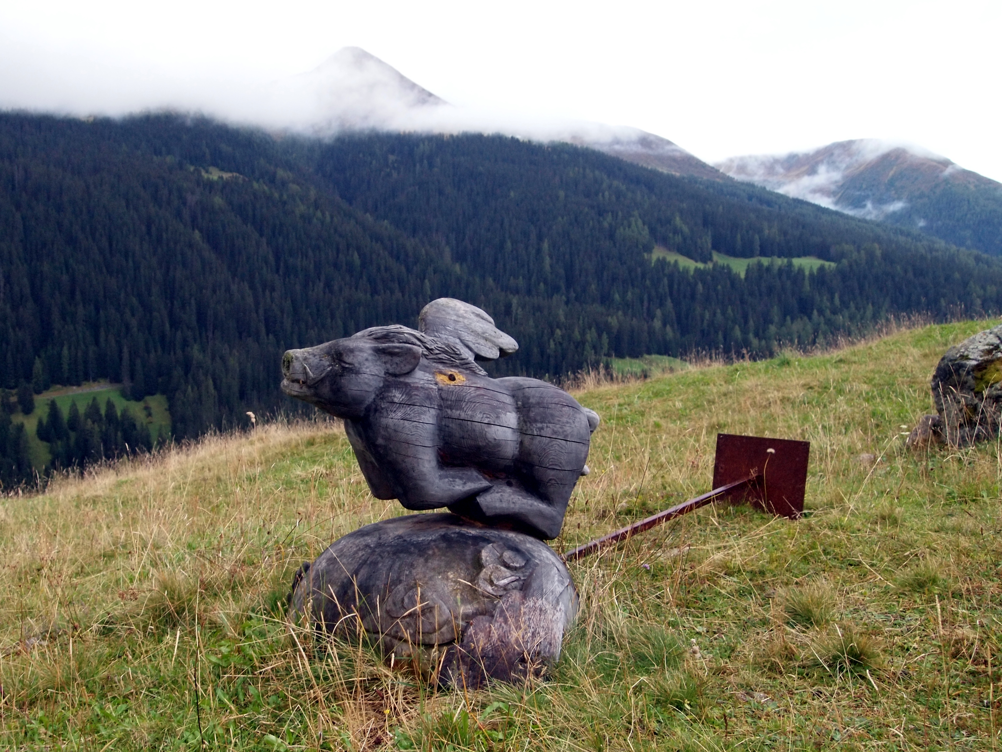 Skulpturenwanderweg bei Davos Frauenkirch, Abstieg von der Stafelalp